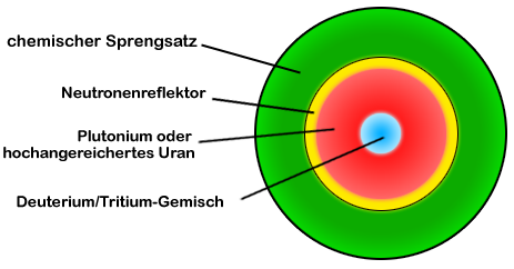 Design einer Fissionsbombe